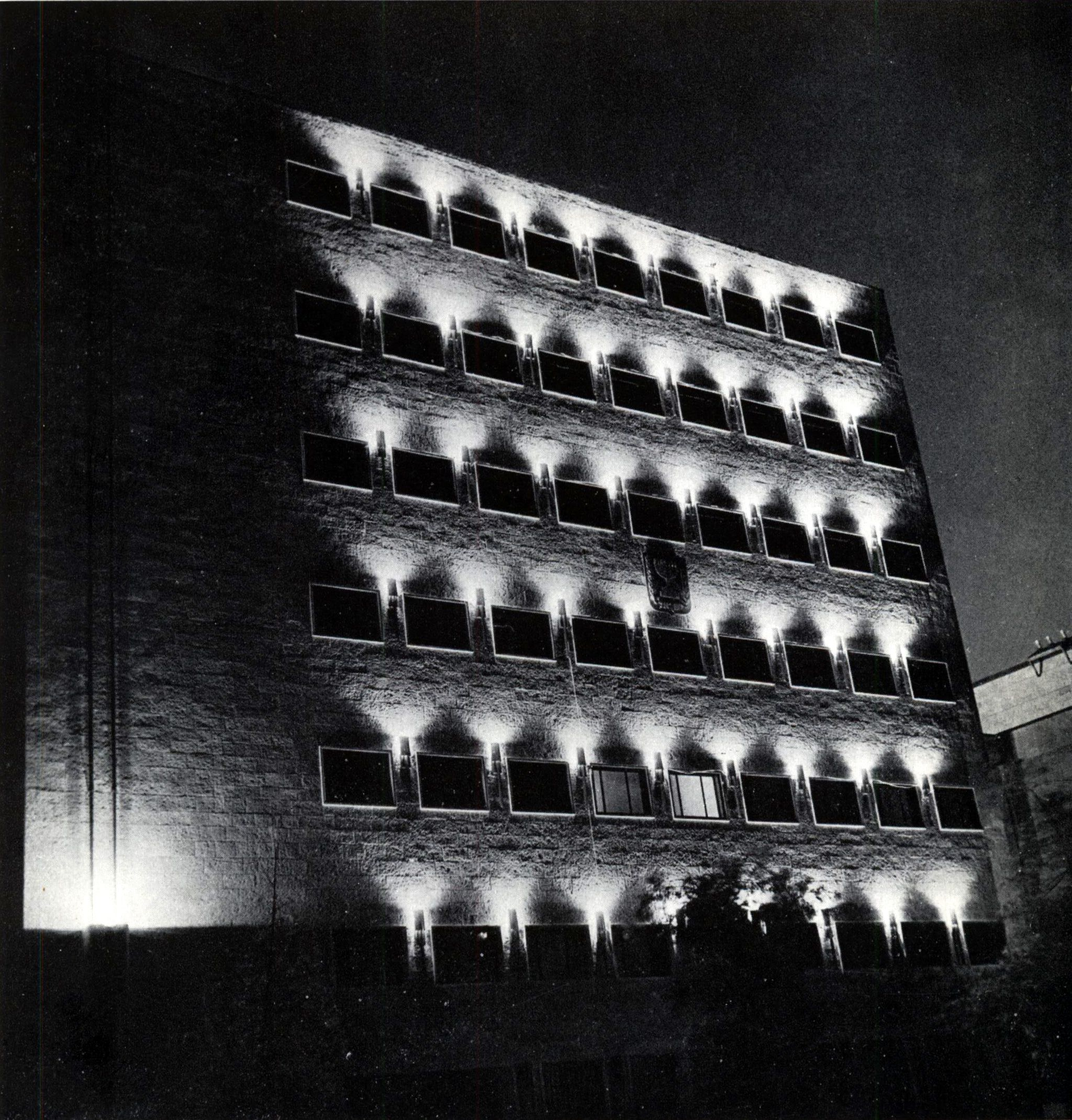 תאורת בנין משרד המשפטים בירושלים לרגל חגיגות העשור